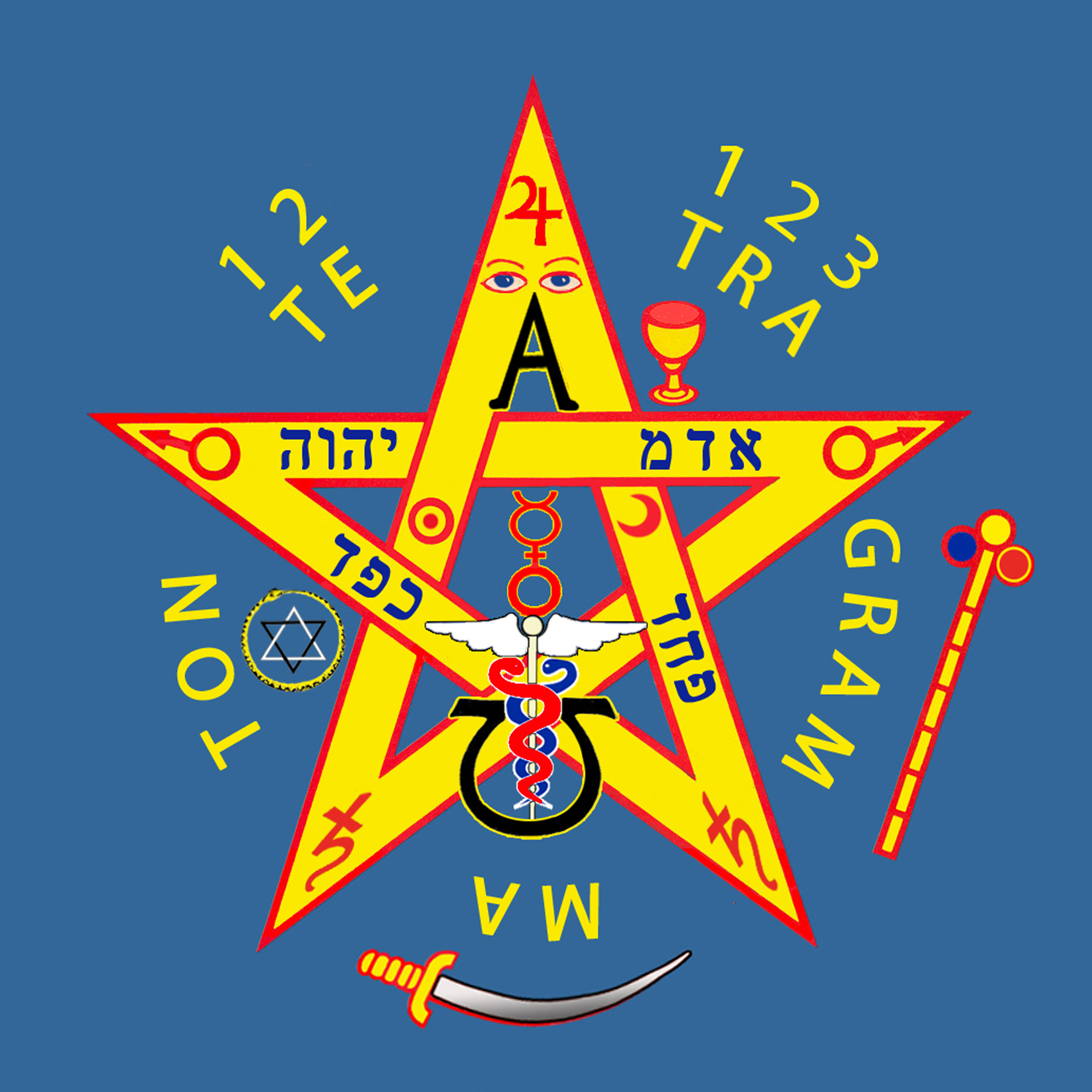 la estrella de cinco puntas llamada Pentagrama o Pentalfa, representa al “Microcosmos Hombre” o, a la “Estrella Microcósmica” Es un simbolo poderoso de fuerza y protección